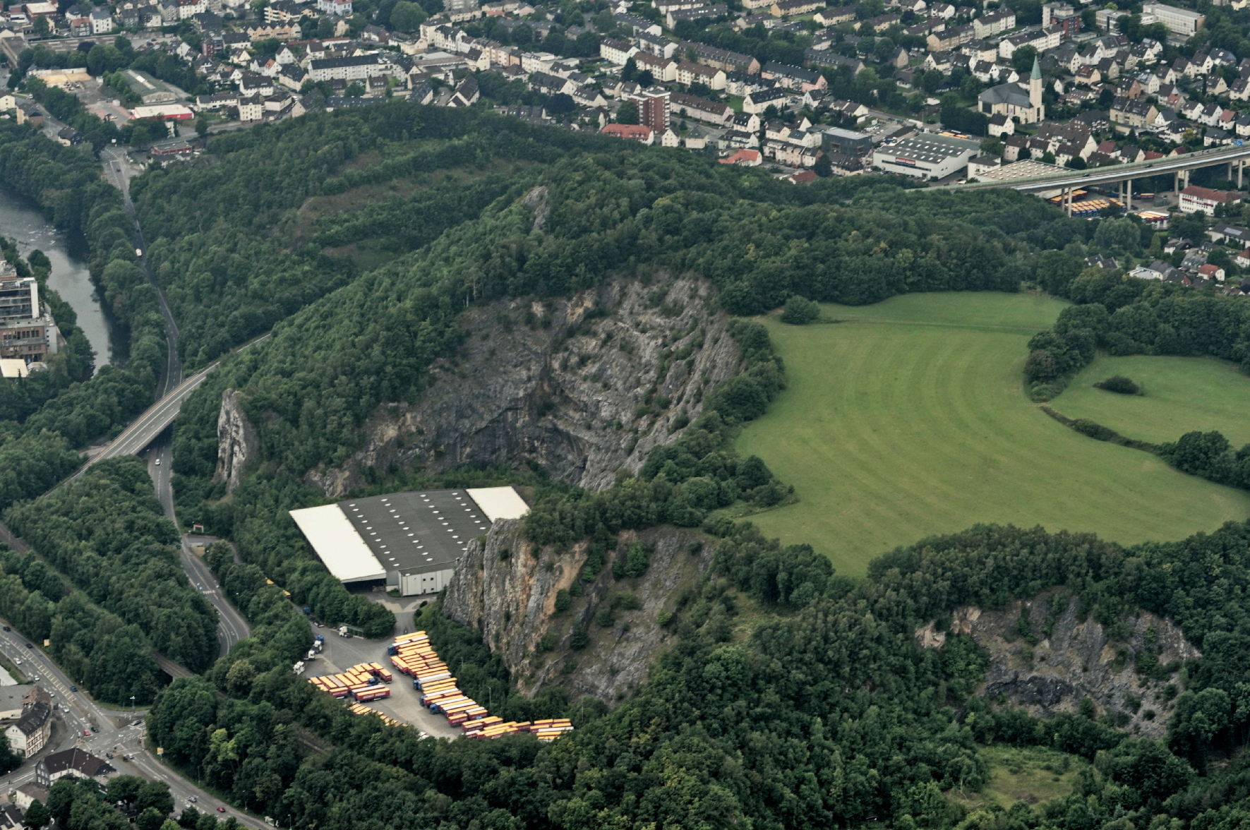 Fotoflug Sauerland Nord. Iserlohn-Oestrich, Steinbruch und Felsformation Pater und Nonne am Burgberg, Naturschutzgebiet Burgberg, Kulturdenkmal Wallburg auf dem Burgberg, Bundesstraße 236, Blickrichtung Nordwest The making of this document was supported by the Community-Budget of Wikimedia Germany.